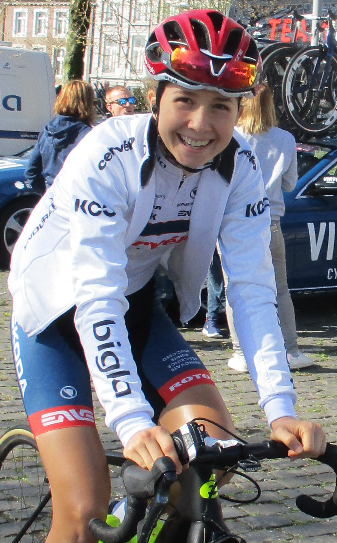 Start van de Amstel Gold Race Ladies Edition 2018 in Maastricht.